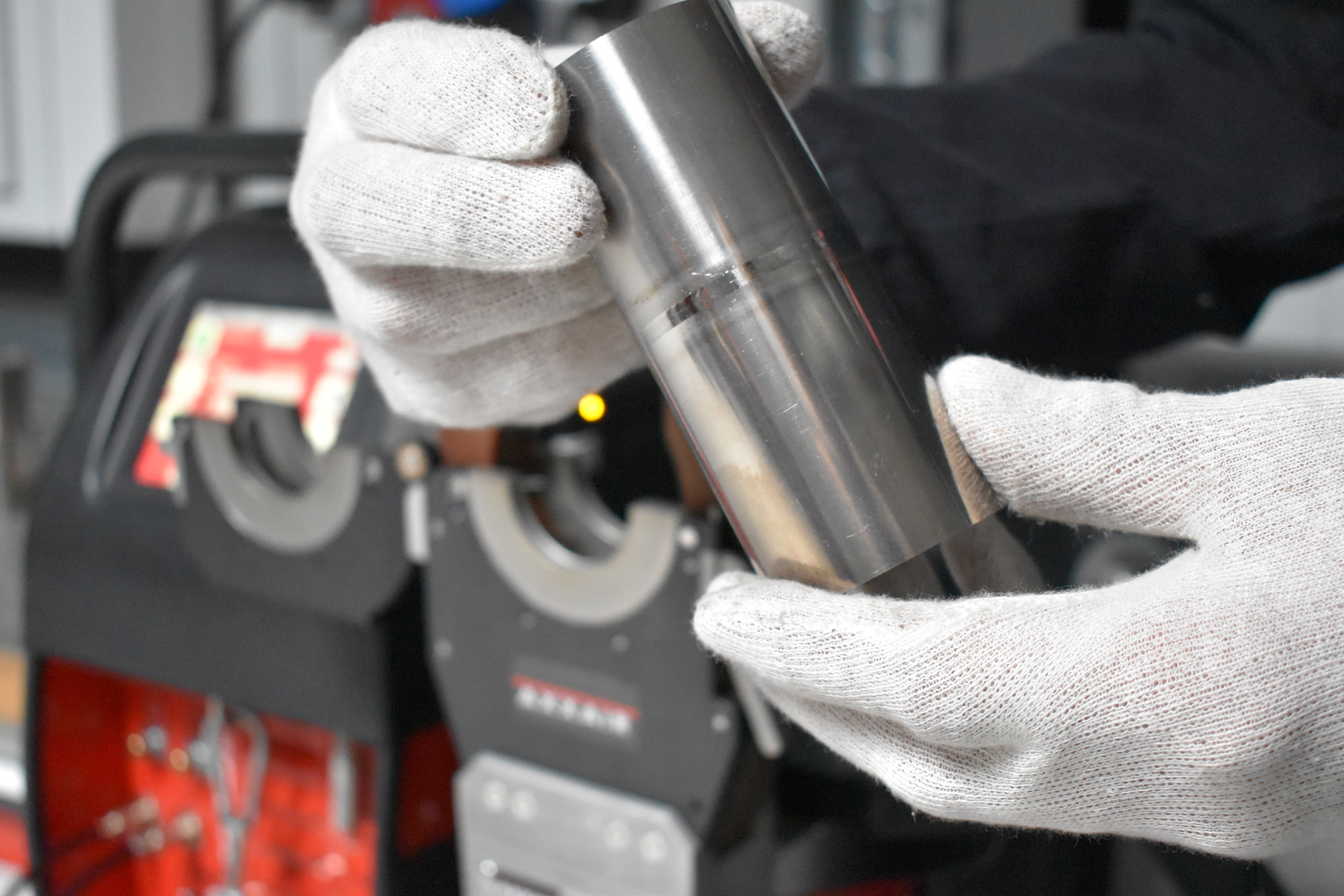 Soudage orbital réalisée avec une tête fermée